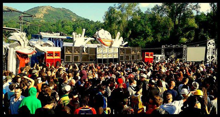 Free party italia. 15 anni di compleanno tribe kernel panik